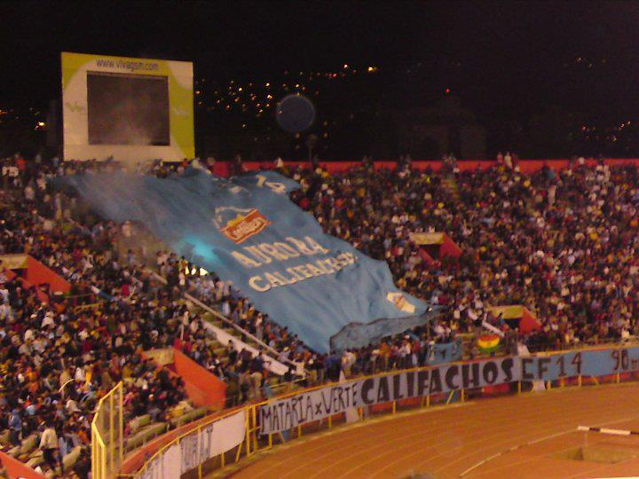 Hinchas del Club Aurora